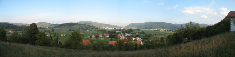 Panorama Ravne Gore